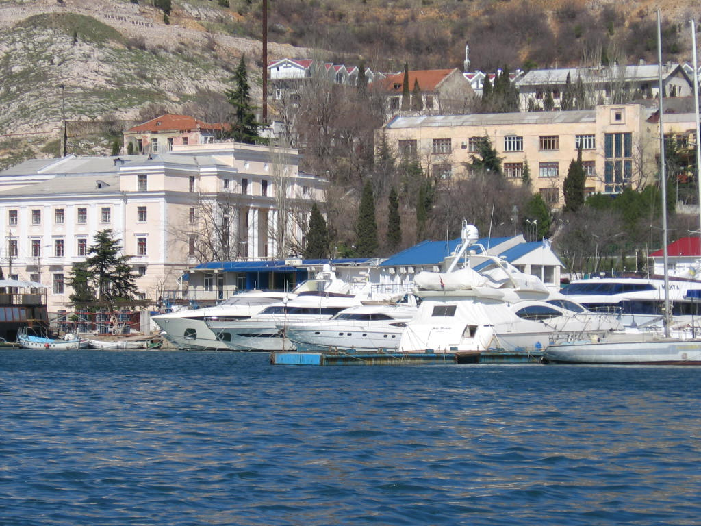 Здание ЭПРОН, Балаклава, Военизированный морской водолазный техникум Экспедиции подводных работ особого назначения (ЭПРОН), с 1955 Балаклавский Дом Офицеров Флота